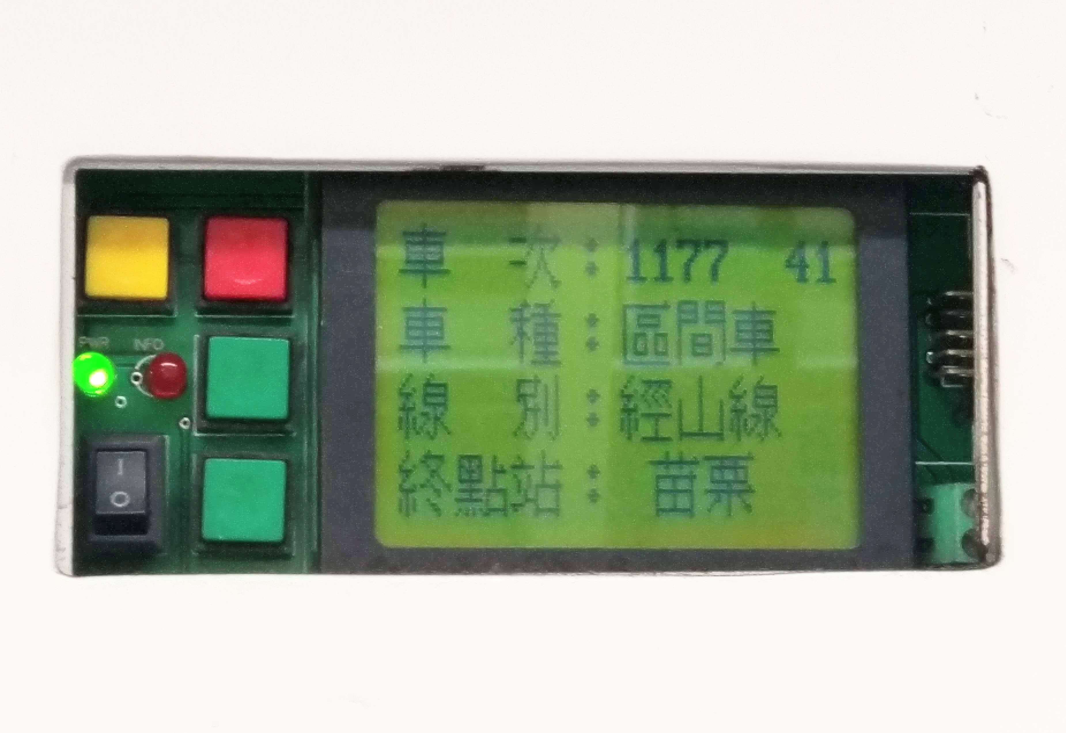 中文（台灣）: 台鐵EMU700型電聯車的列車資訊顯示器操控面板